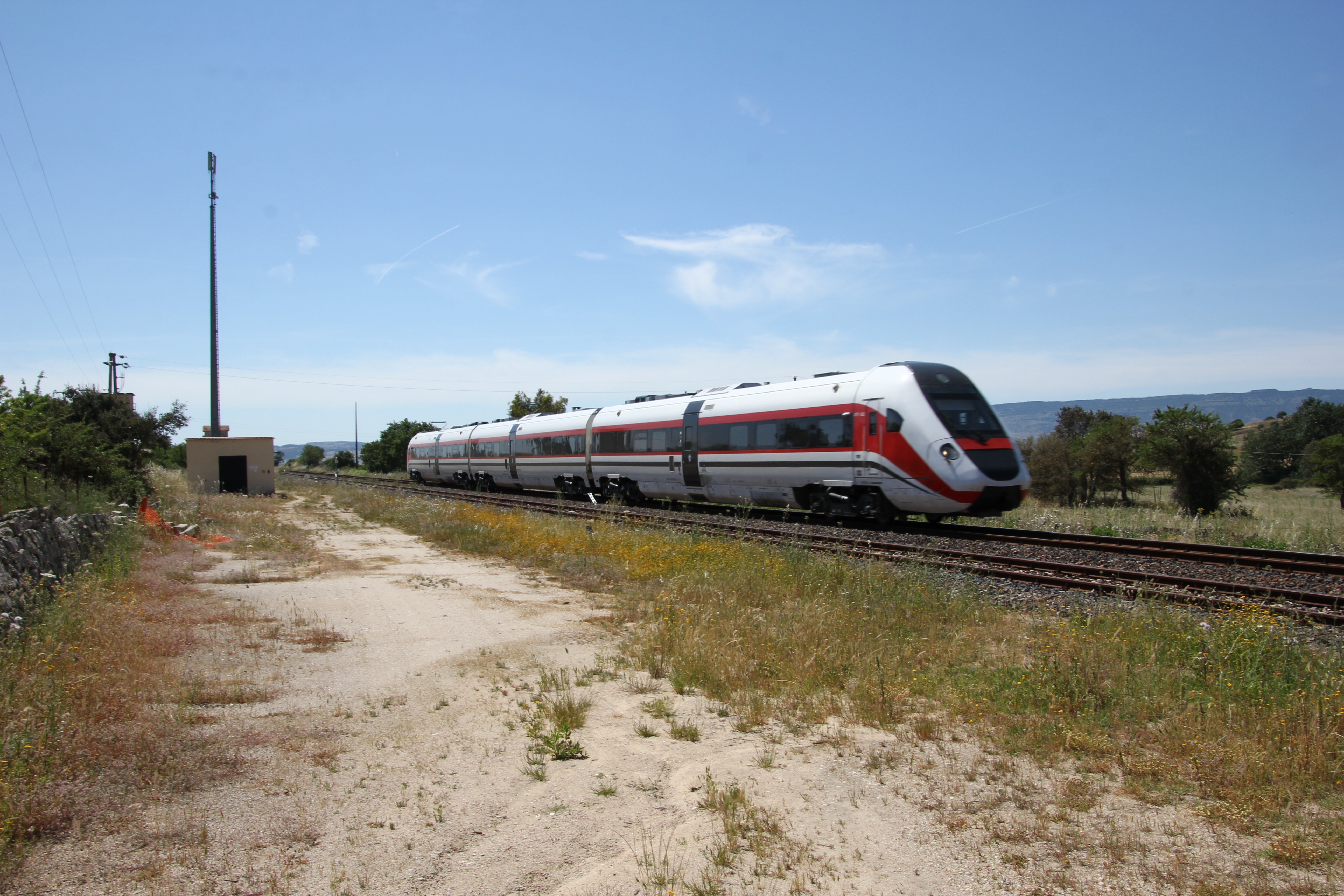 Autotreno ATR 365